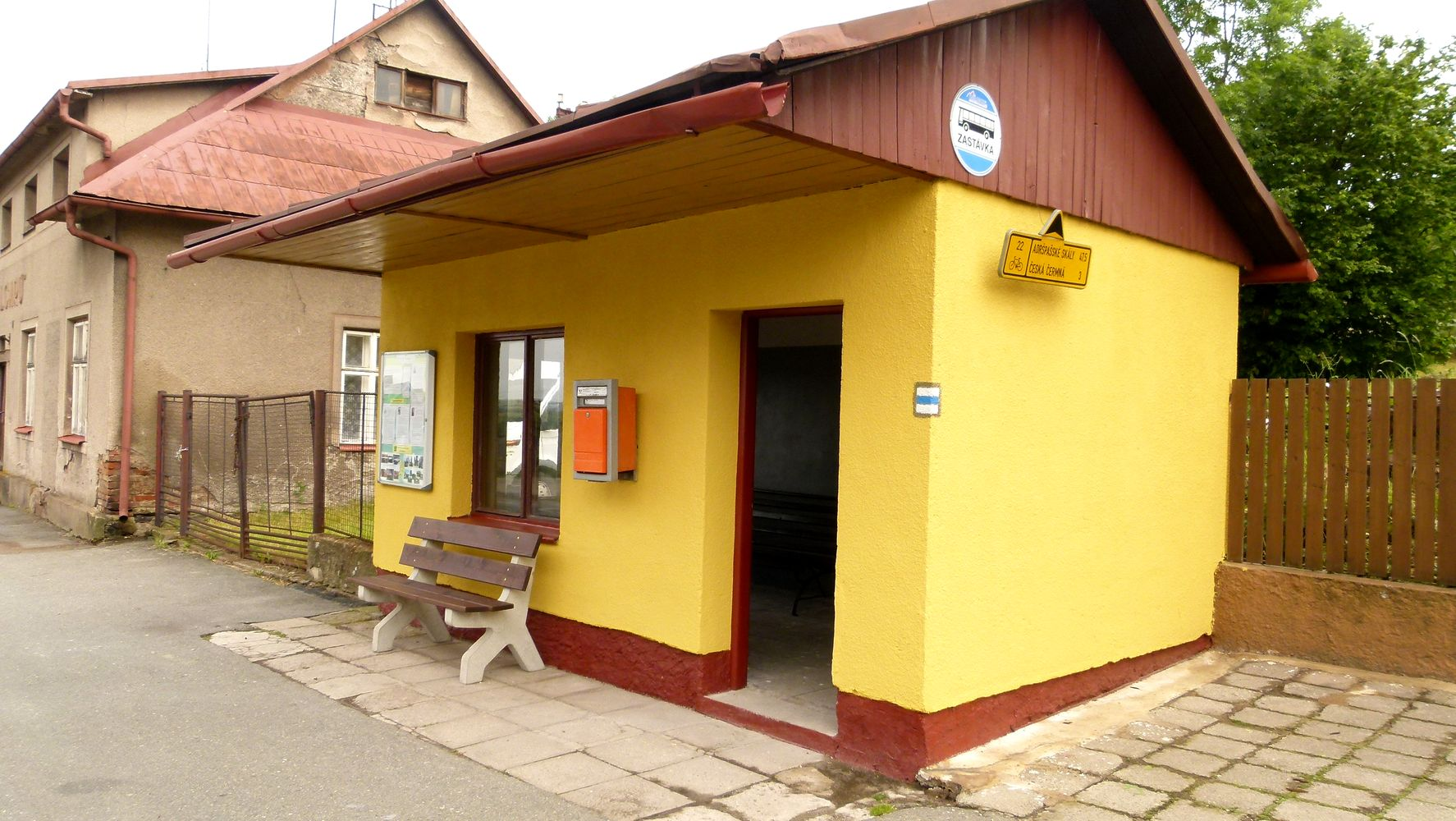 Zastávka